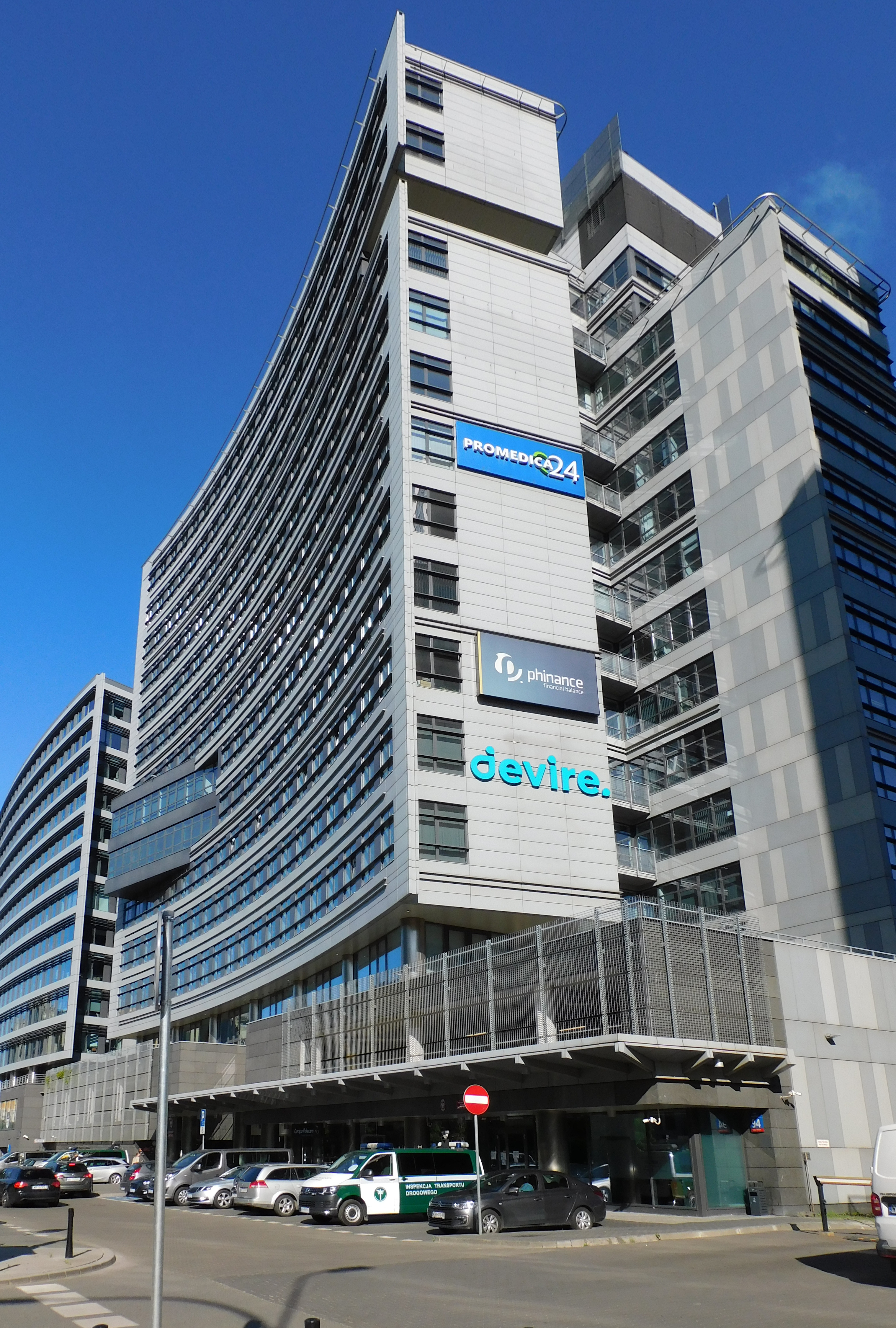 Biurowiec Equator I w Warszawie, siedziba m.in. Głównego Inspektoratu Transportu Drogowego